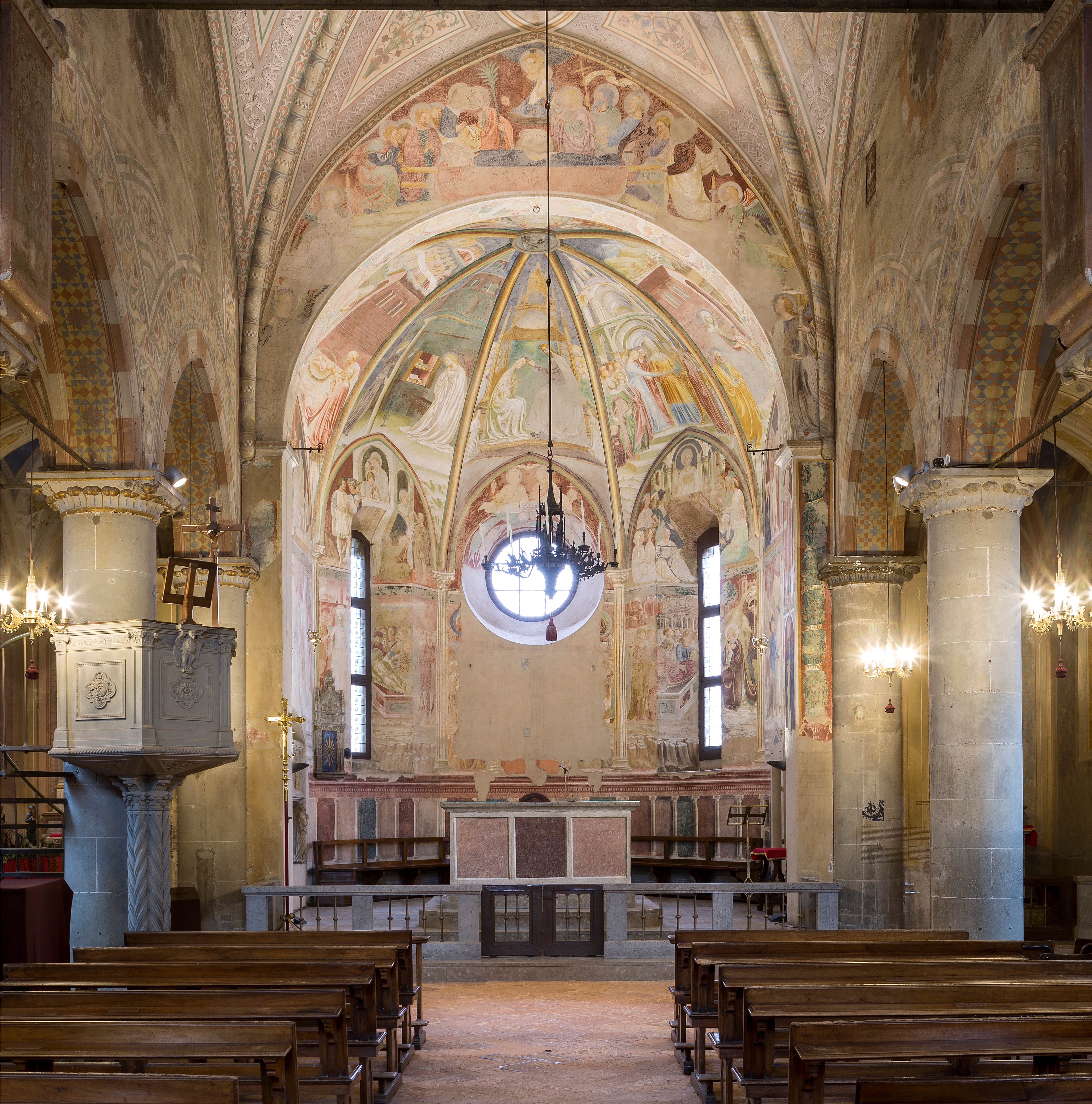 L'armonioso interno della Collegiata, con l'abside affrescata da Masolino (volte) e da Paolo Schiavo e dal Vecchietta (pareti).